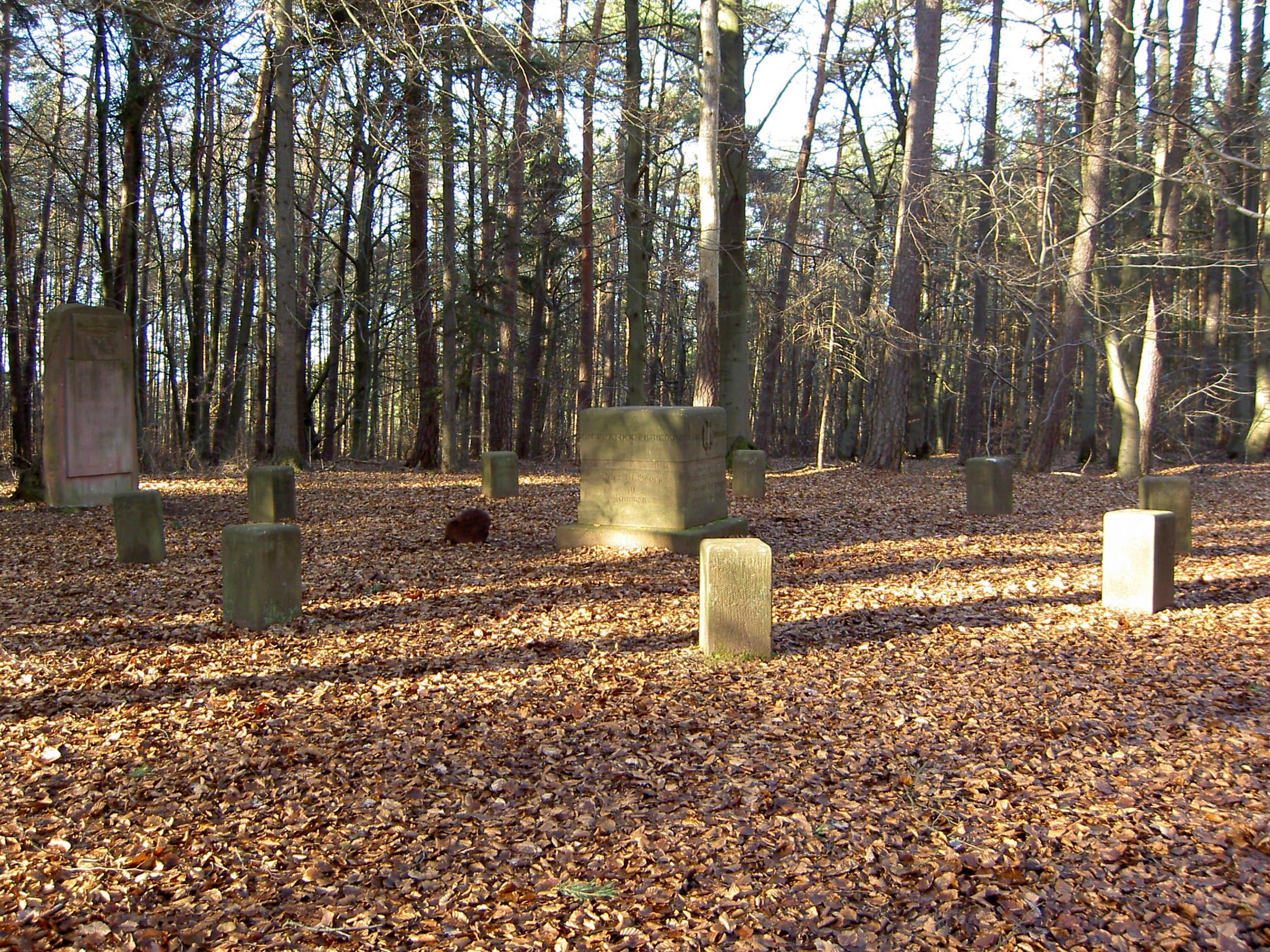 Stumpfwaldgericht bei Enkenbach-Alsenborn